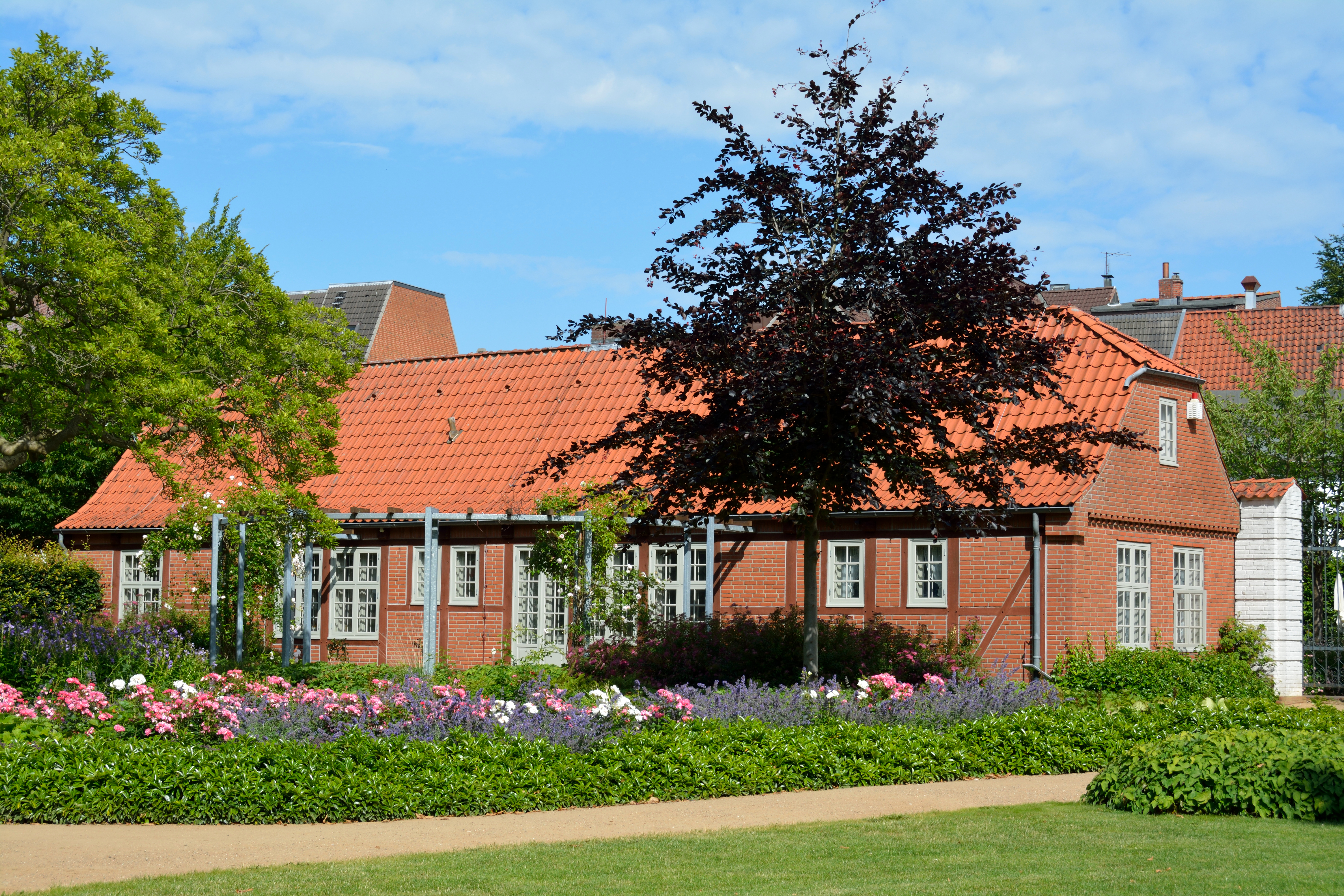 Das sogenannte "Kutscherhaus" im Prinzeßhof Itzehoe